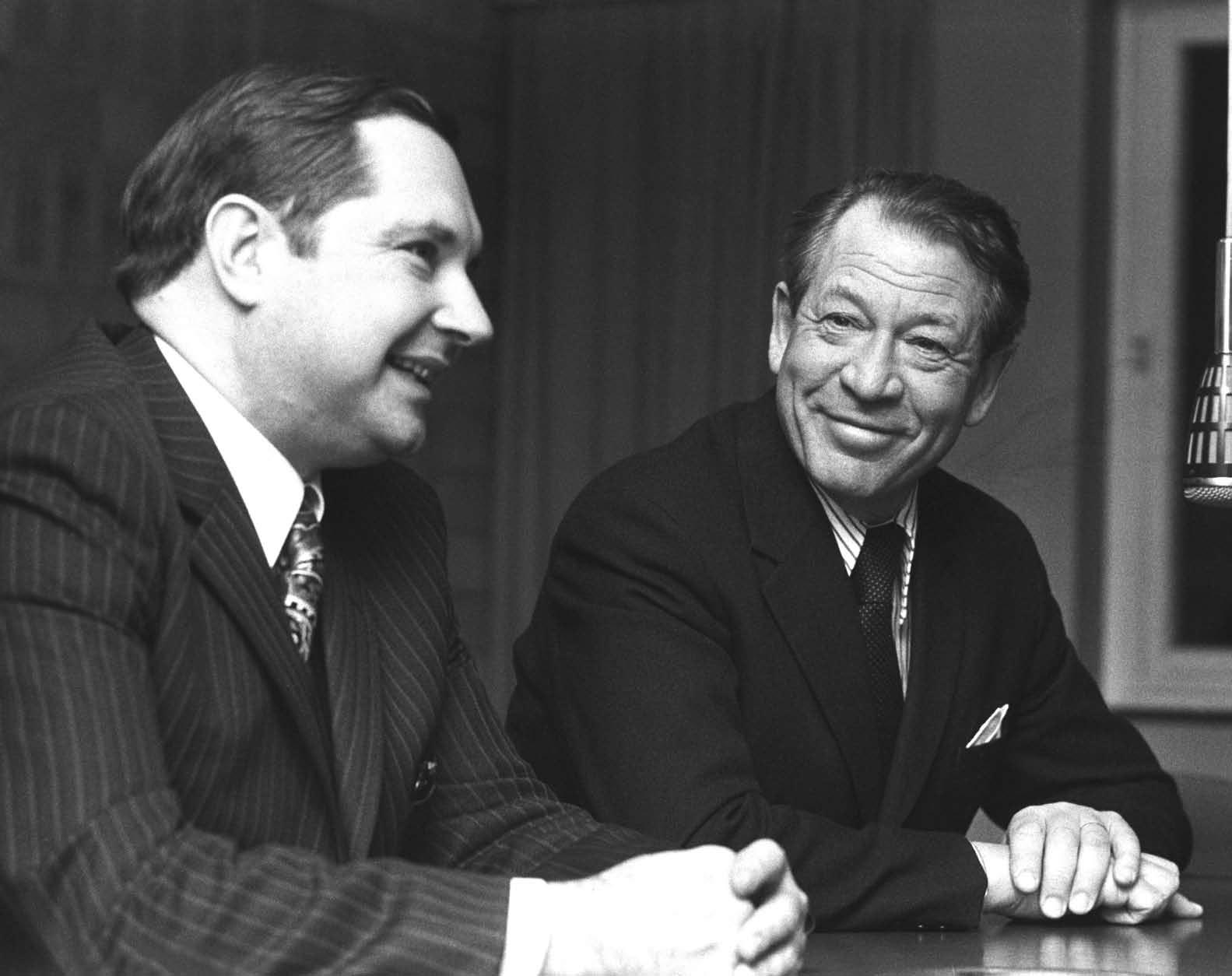 Jens Evensen til høyre.